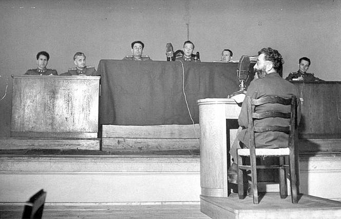 Srpskohrvatski / српскохрватски: Optuženi Dragoljub Mihailović pred Vrhovnim sudom u Beogradu 1946.